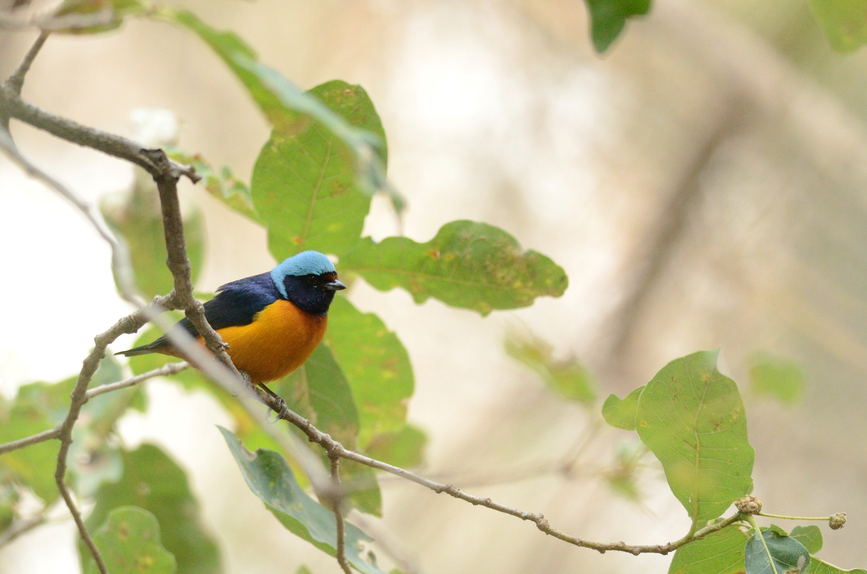 Euphonia elegantissima